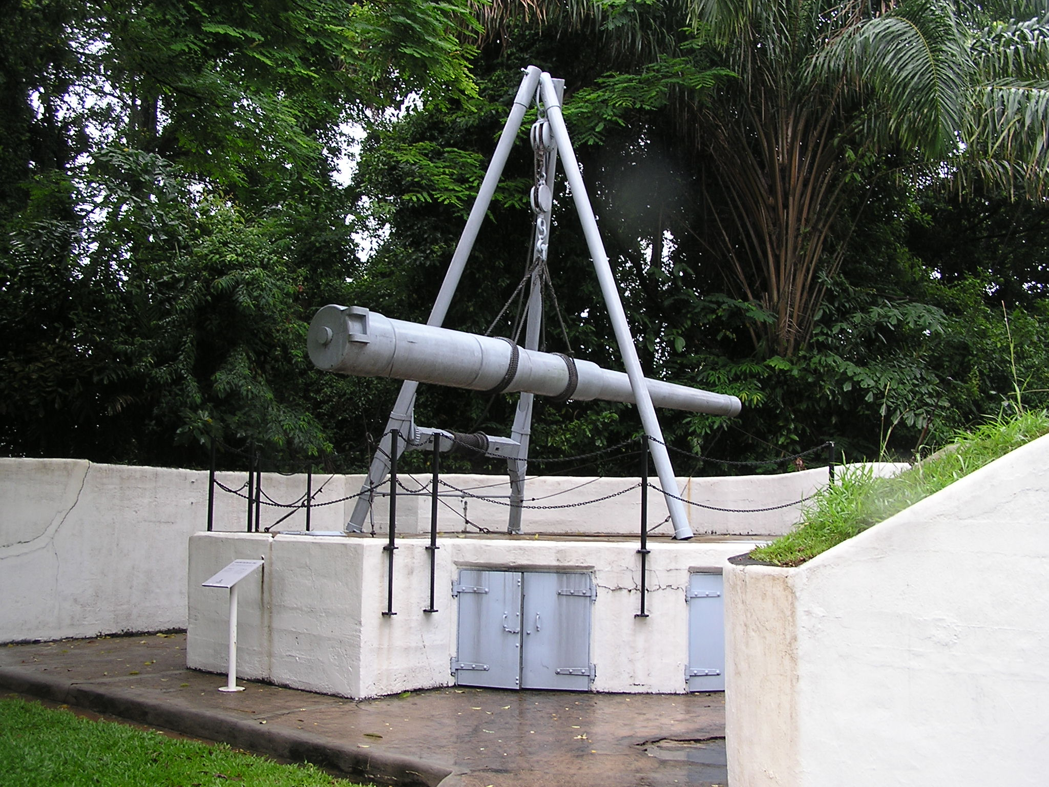 64 Pfund RML Gun